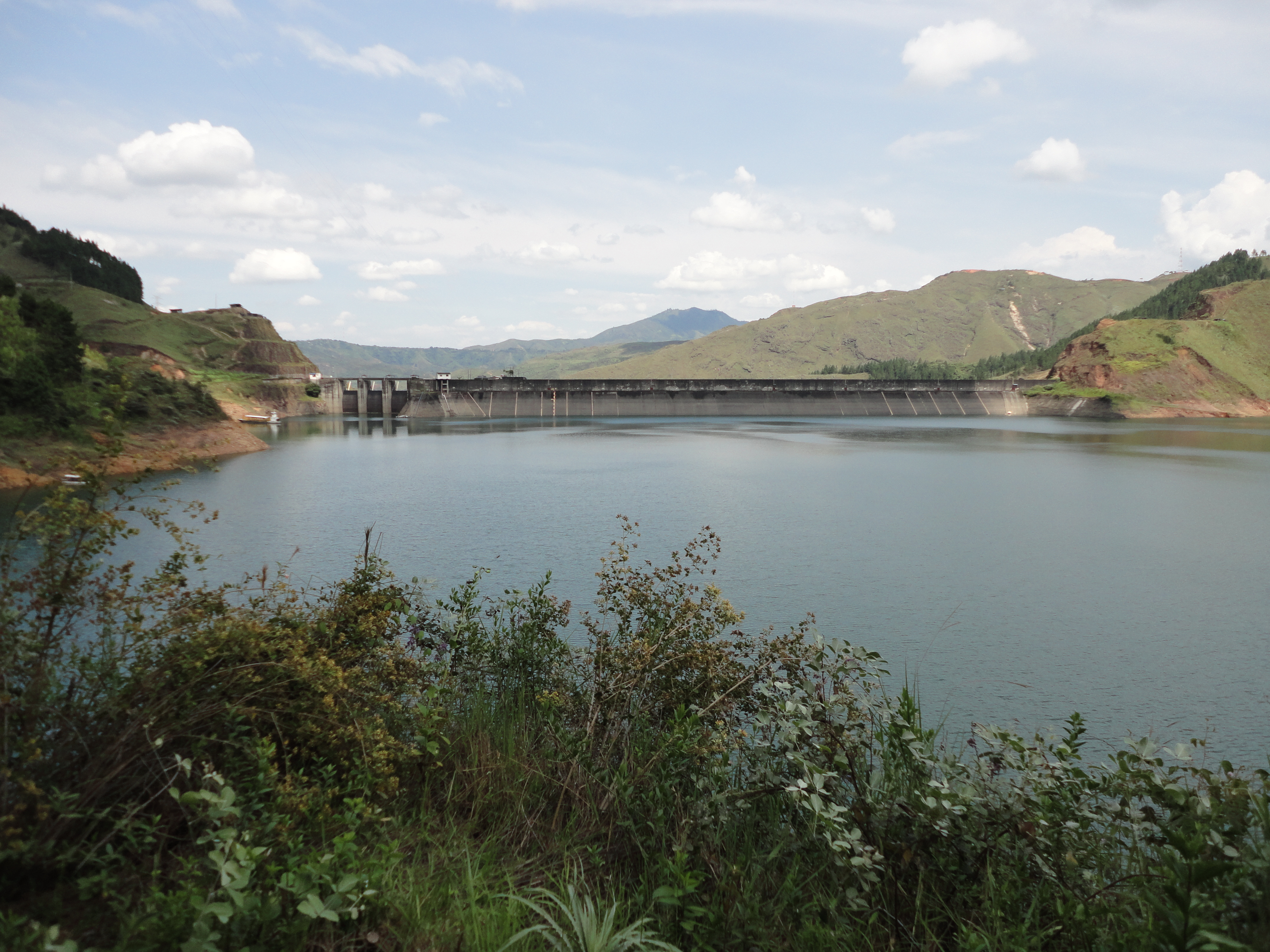 La Represa Salvajina en el departamento Cauca, Colombia